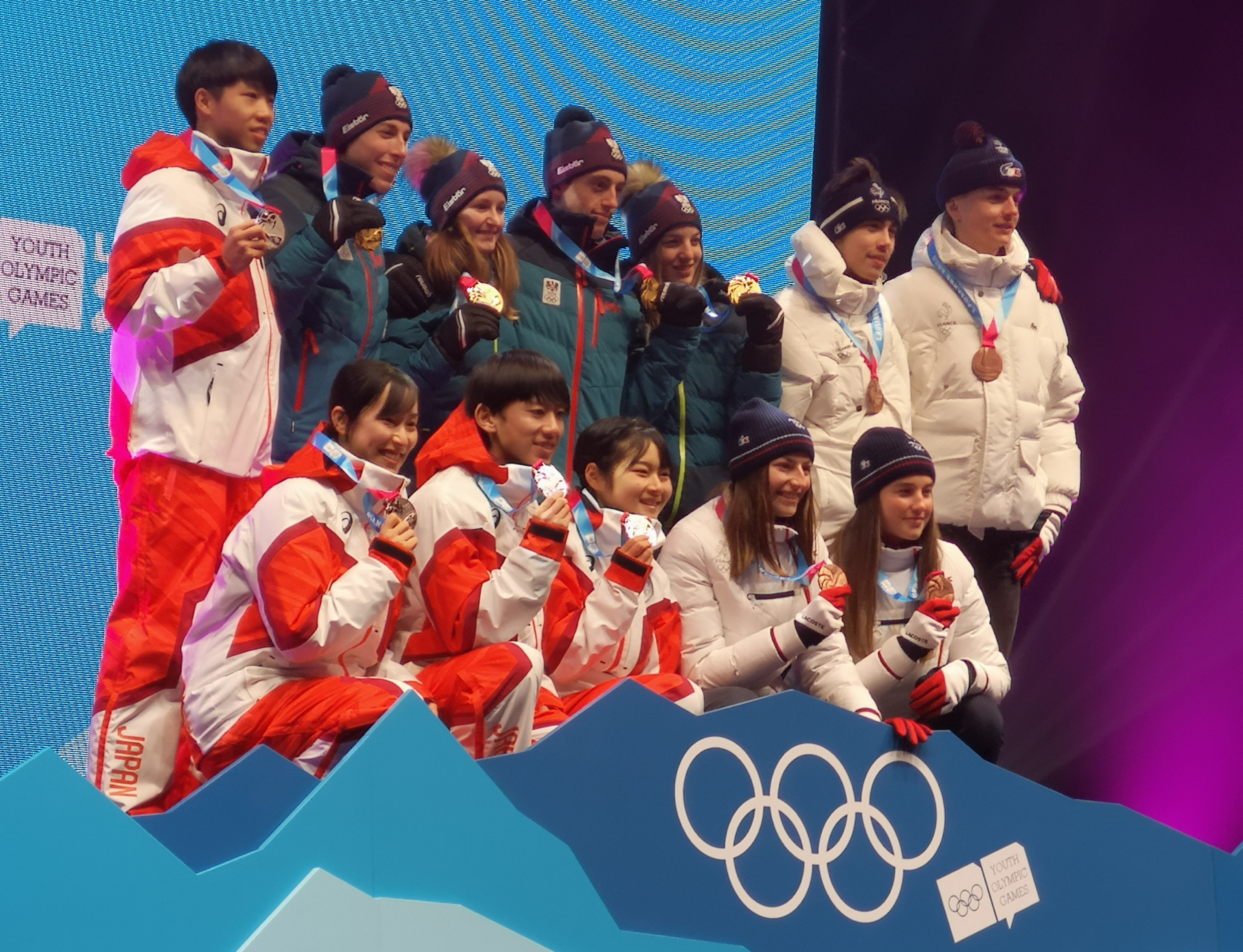 Le podium du saut à ski par équipes des JOJ de Lausanne 2020 : Autriche, Japon et France.